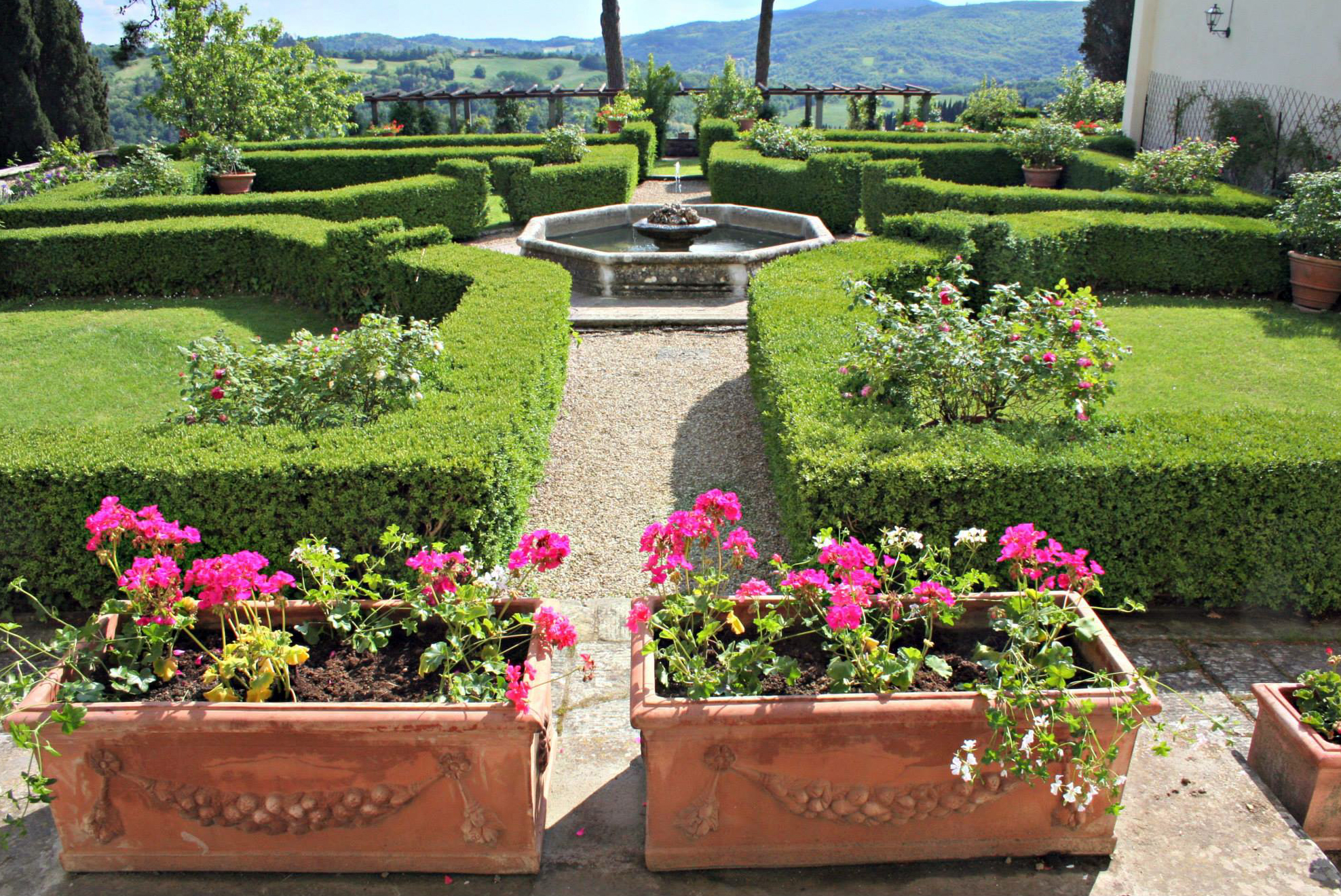 Villa di bivigliano 04 giardini